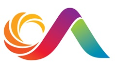 서산시 통합브랜드